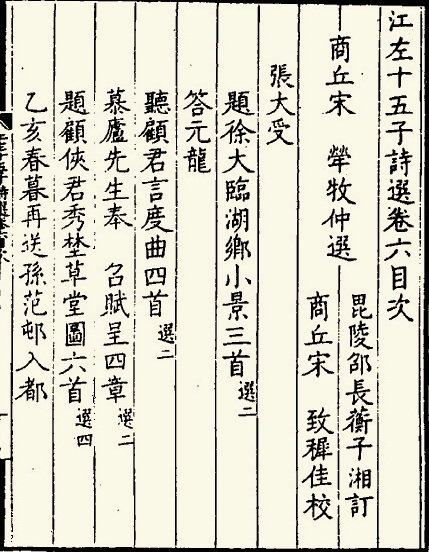 宋犖《江左十五子詩選》（Collection of Poems by 15 Poets "Jiangzuoshiwuzi"）卷六目次，清康熙四十二年（1703）宋氏宛委堂刻本。